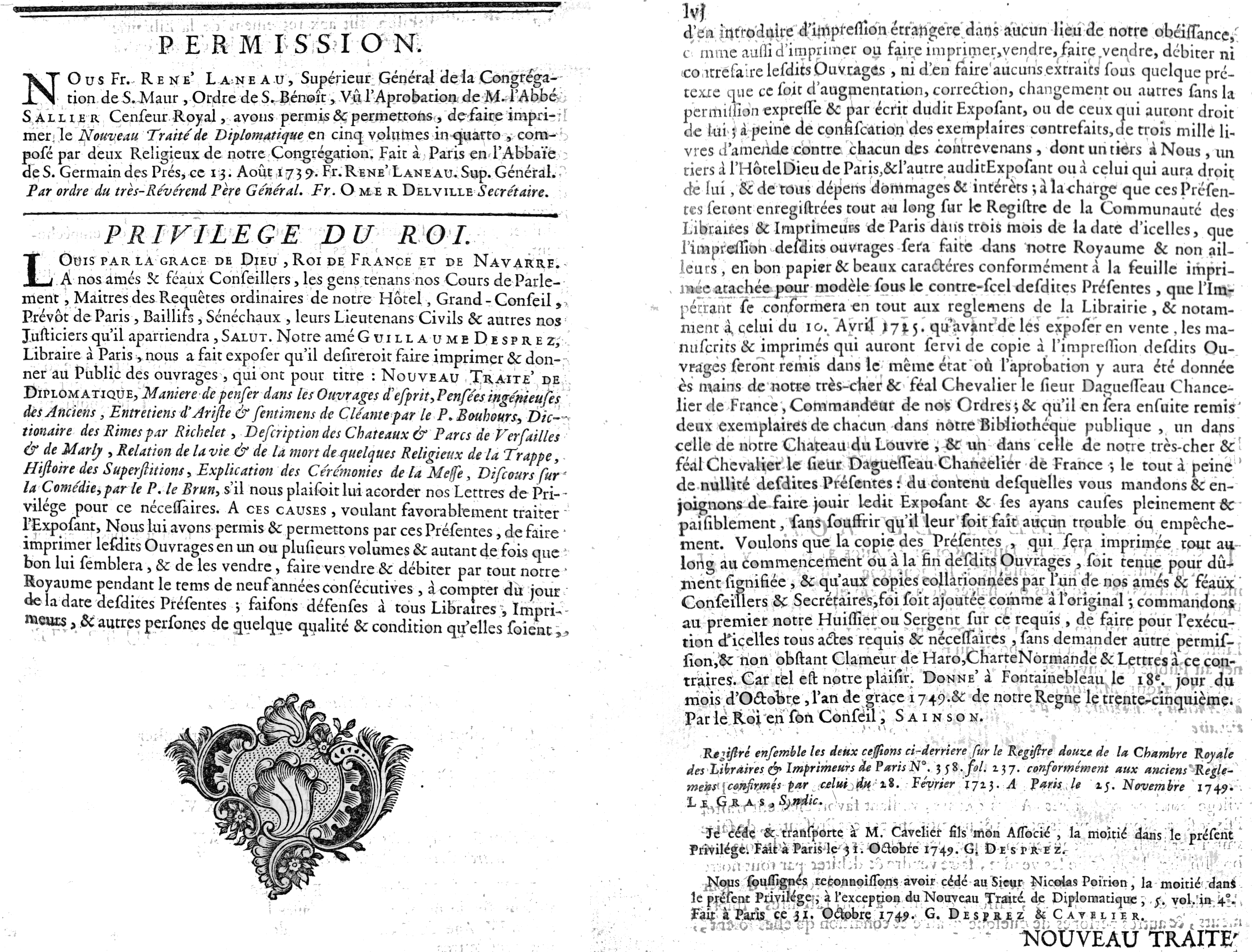 publié dans le tome 1 de "nouveau traité de diplomatique...".